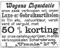 Advertentie in de Limburger Koerier voor de liquidatieverkoop van de kunsttinfabriek "Urania" (1902-1910) in Maastricht.